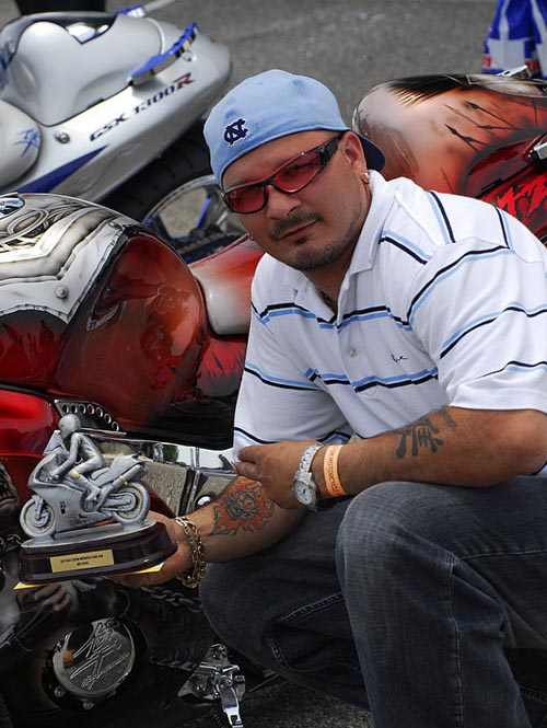 Black Bike Week Festival 2008